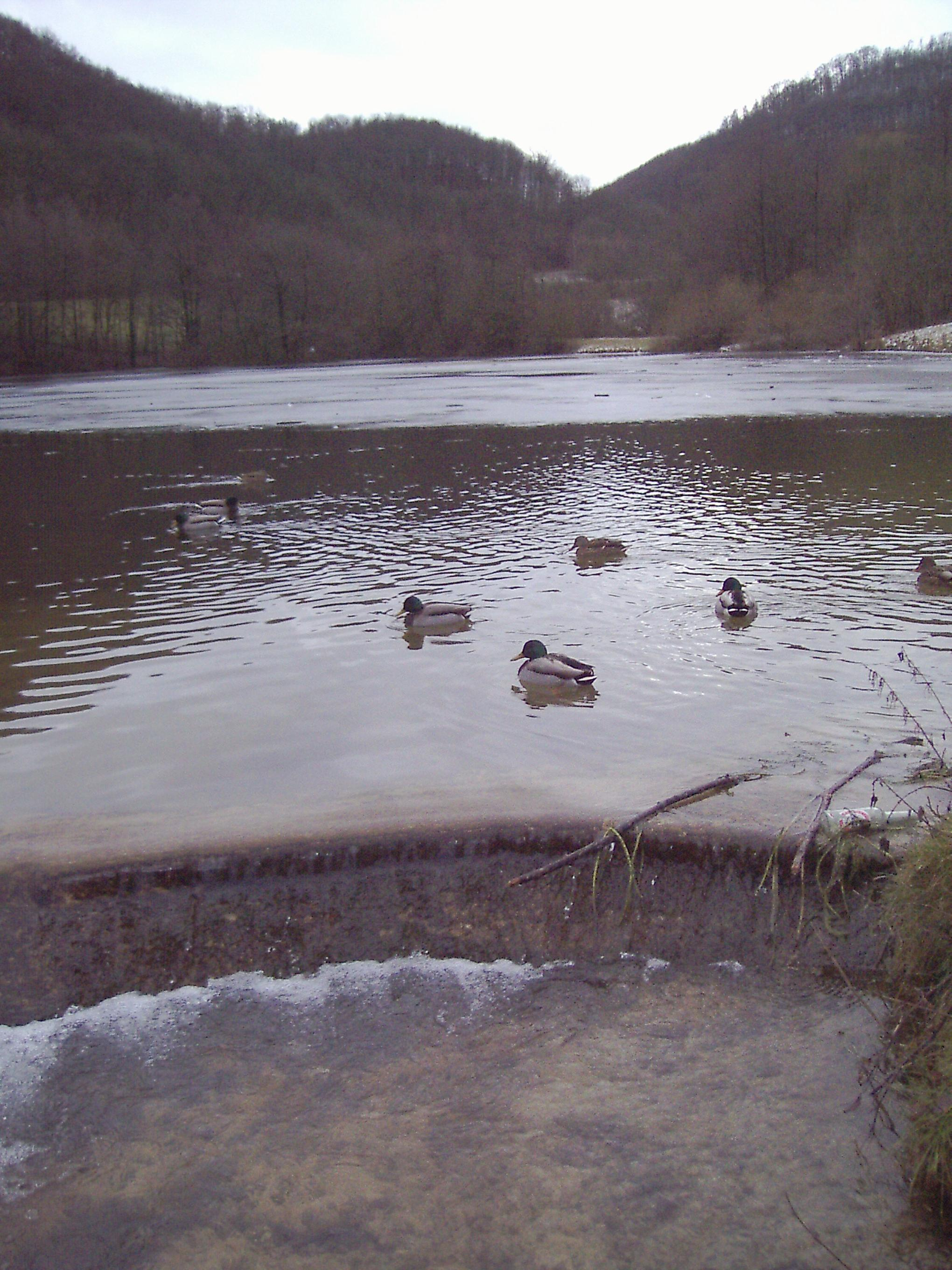 Unterer Gönninger See mit Ablauf und Stockenten. Der See wurde im Zuge der Renaturierungsmaßnahmen des Gönninger Kalktuffabbaus von der Wiesaz geflutet.